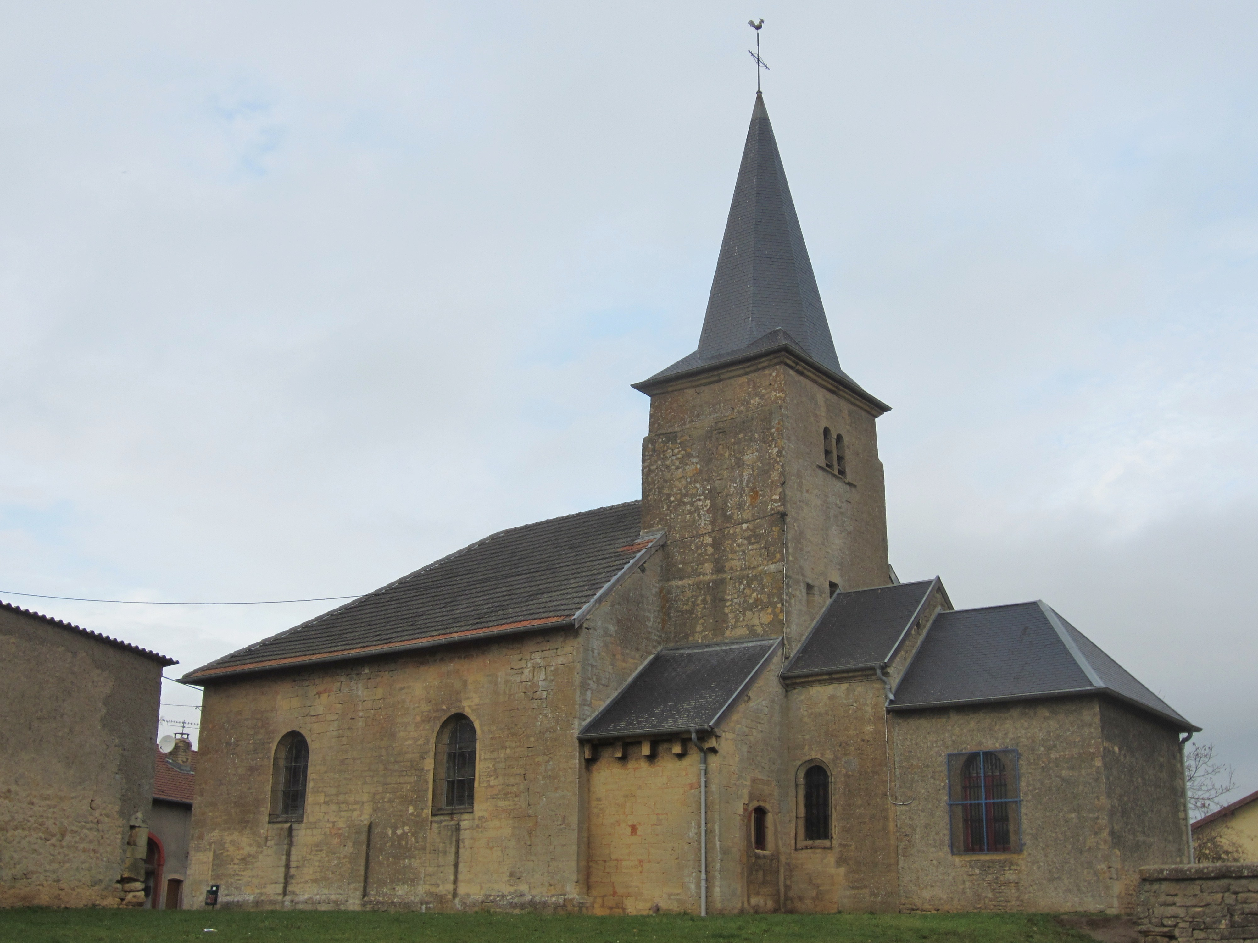 Description chapelle Mont Bonvillers Bonvillers Date8 November 2011Sourcemon appareil photoAuthorAimelaimePermission (Reusing this file) chapelle Mont Bonvillers Bonvillers